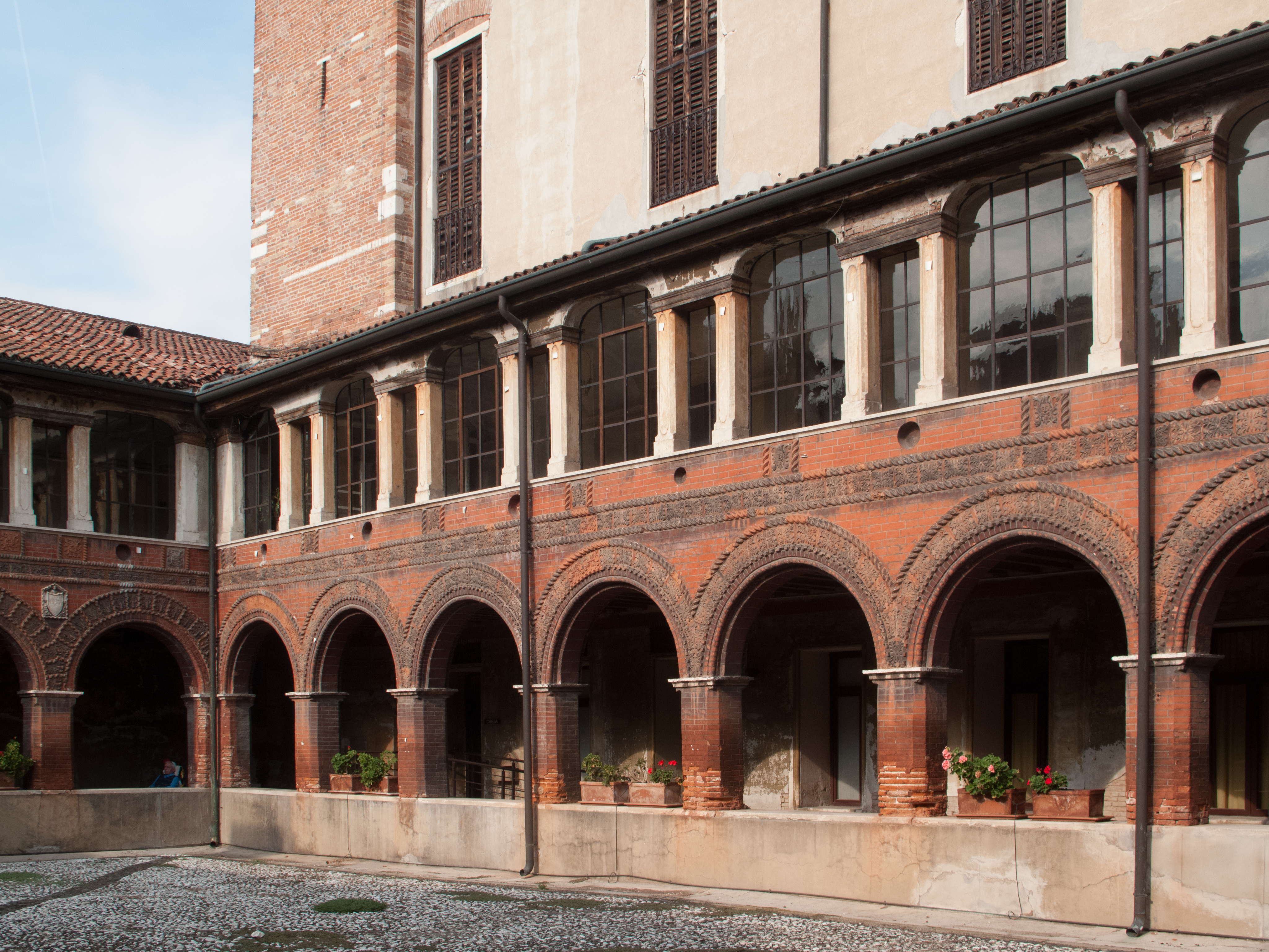 Chiostro